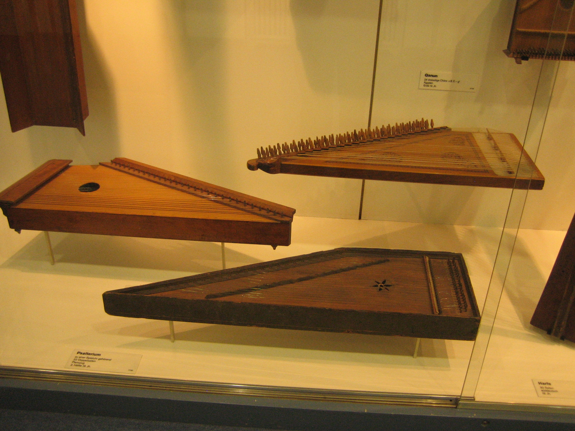 Qanun & Psalterium, Deutsches Museum Qanun 24 ... Agyp... Endie ... Psalterium zu einer Spieluht get... 22 Doppele... Plano... 2 Ha... 18 jh